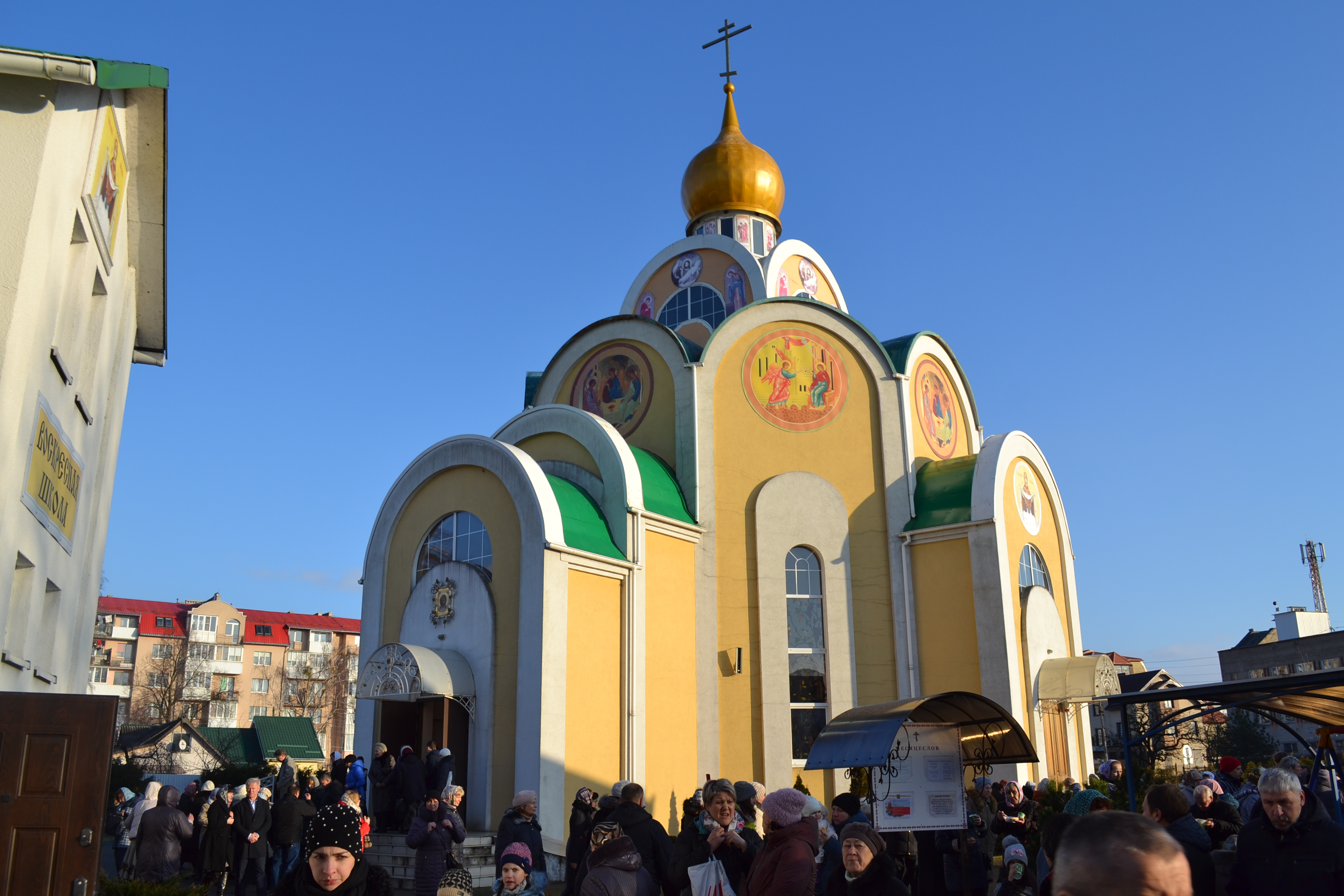 Храм святой Варвары в городе Светлом Калининградской области